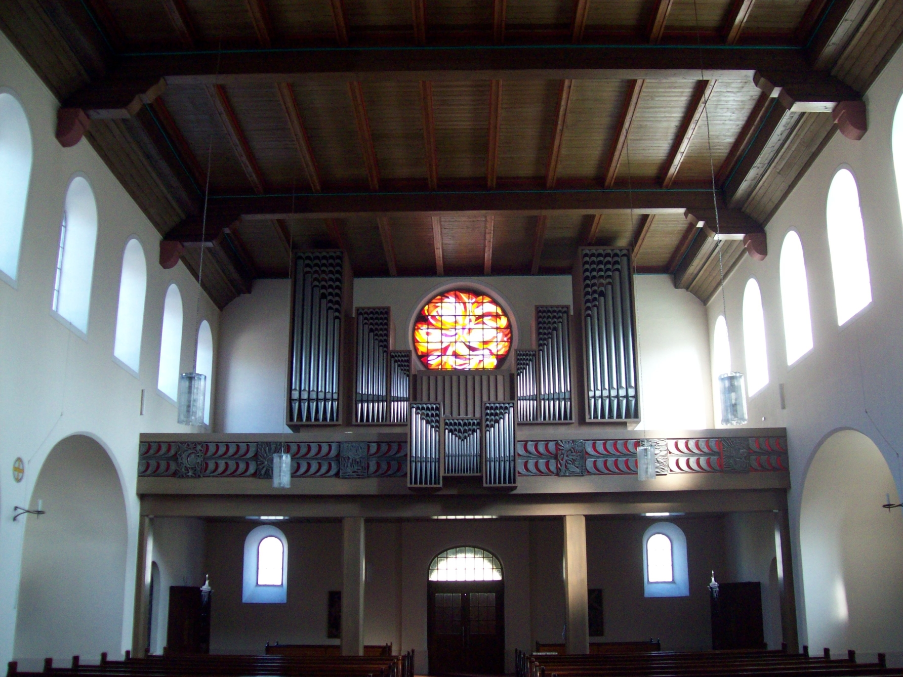 Kapuzinerkirche Aschaffenburg Orgelempore, Orgel von Vleugels, Prospekt und Brüstung von Hermann Kröckel